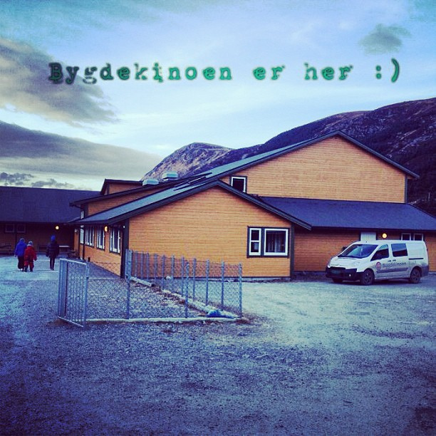 Bygdekinoen på ein av sine mange reiser rundt om i landet for å vise film. Her på YtreStadlandet